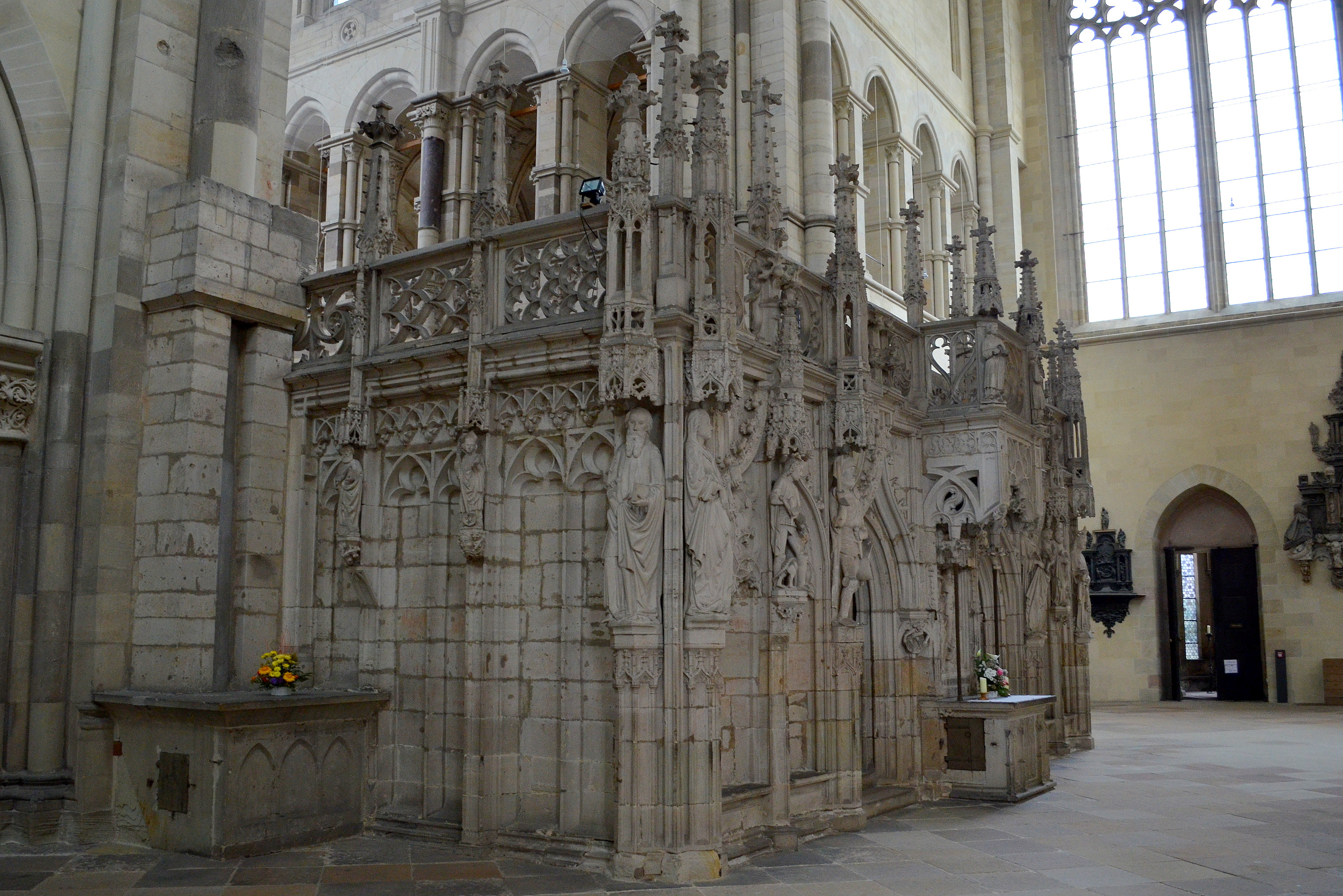 Maagdenburg, domkerk, doksaal